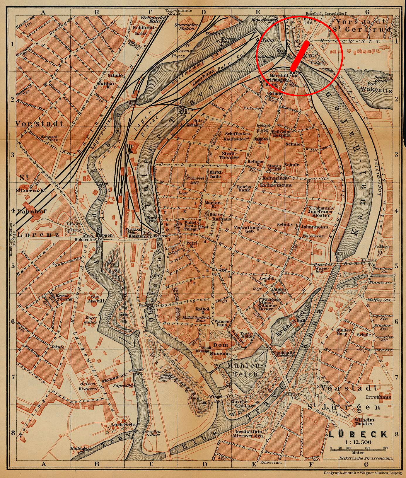 Die Lage der Burgtorbrücke in Lübeck, dargestellt auf einem Stadtplan von 1910